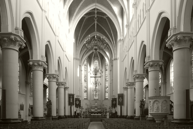 Middenbeuk van de Heilig-Hartkerk te Turnhout.